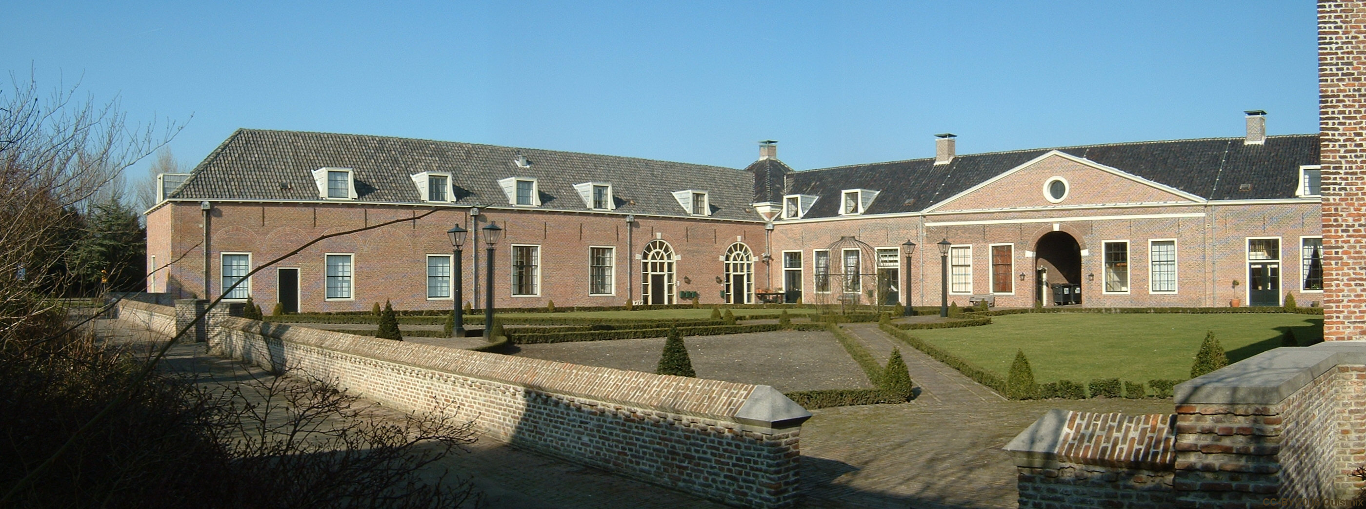 Binnentuin van Huis Honselersdijk - eigen werk. Dit is niet het originele Huis Honselersdijk, maar de Nederhof. Dat is het 'dienstgebouw' dat plaats bood aan stallen en personeel. Het oorspronkelijke Huis Honselersdijk, een van de mooiste Paleizen van Frederik Hendrik, is begin 19e eeuw afgebroken.